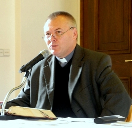 Mons. Michael Slavík na Celostátním setkání animátorů seniorů, 26. 10. 2012, Hradec Králové